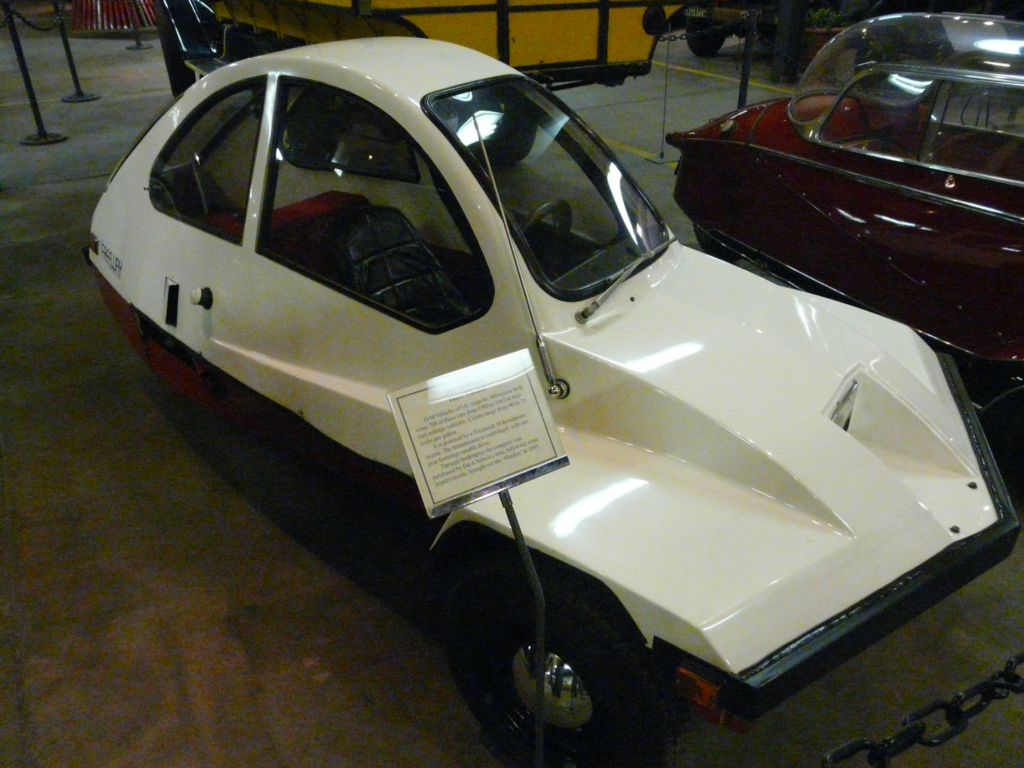 Denver, summer 2012